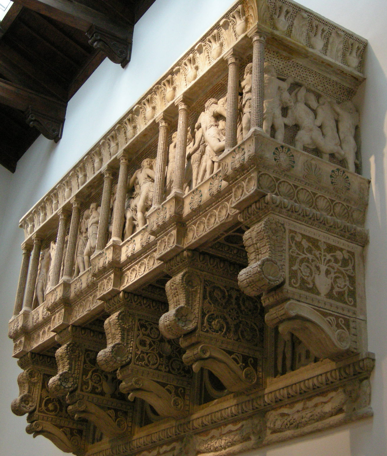 Cantoria di donatello